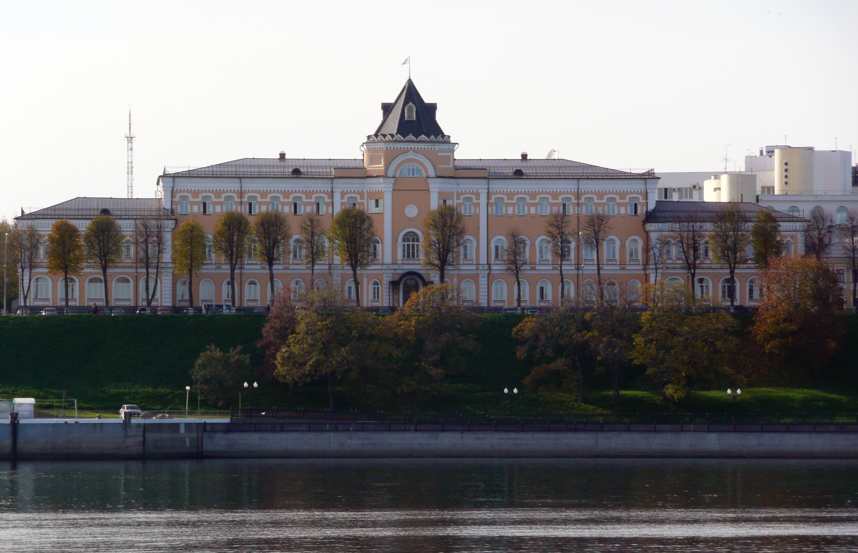 Здание училища девиц духовного звания: набережная Волжская, 59-а, Ярославль, Ярославская область